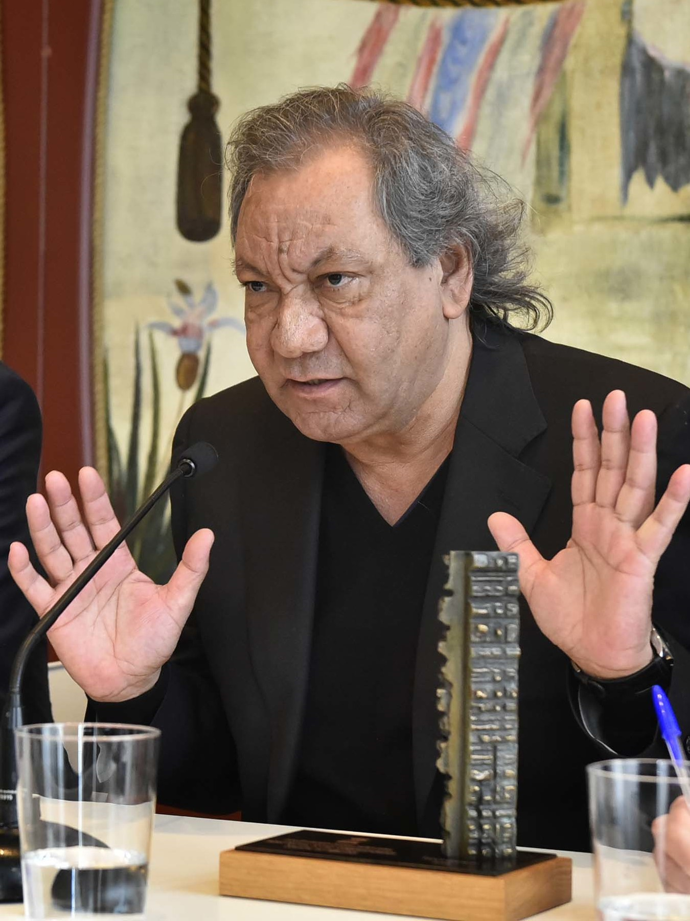 Tony Gatlif: Premio Festival de Cine y DDHH 2016 Fotografía: Iñigo Royo